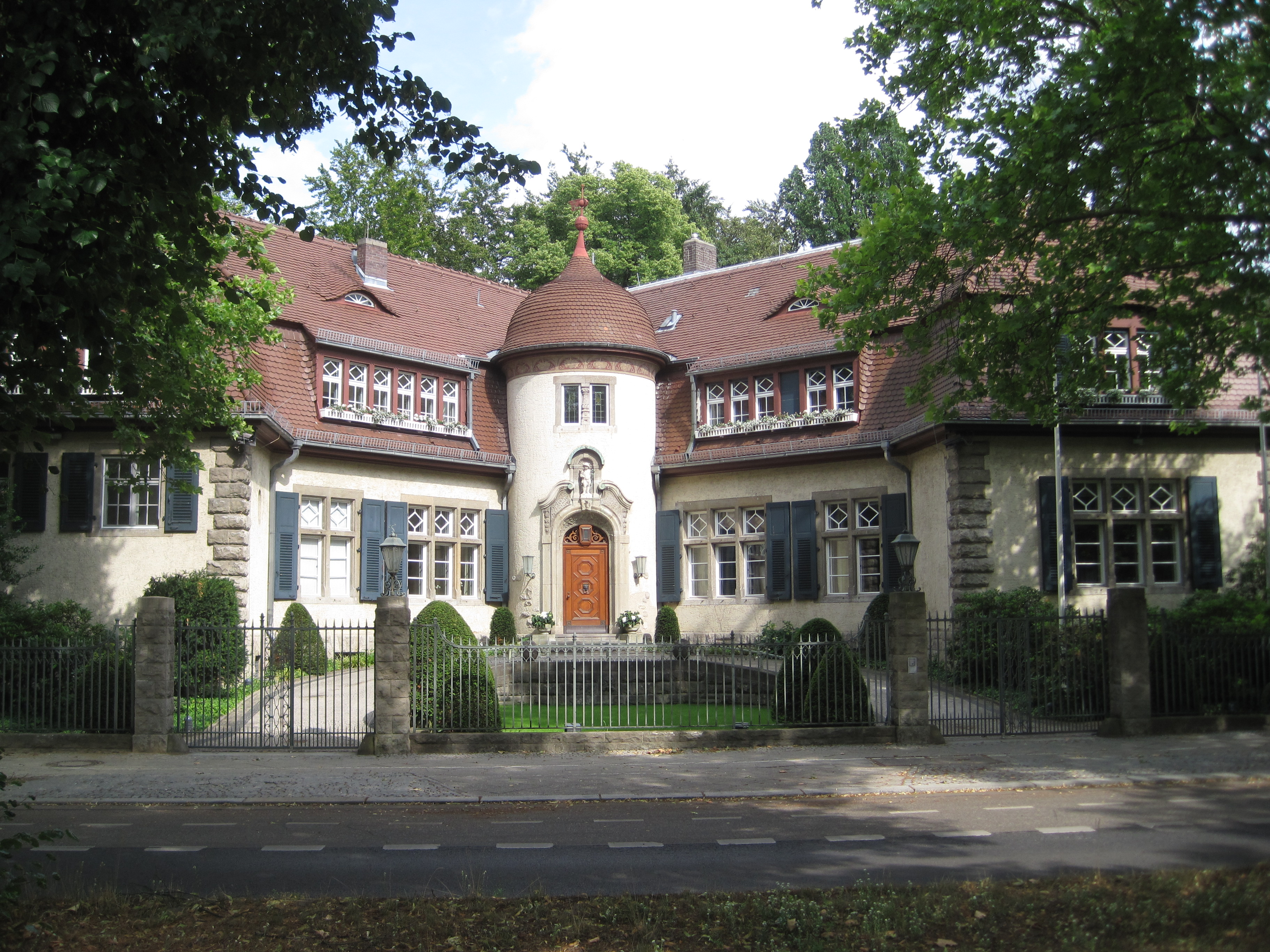 Villa Emil Georg von Stauß, Pacelliallee, Berlin-Dahlem, erbaut 1913-14, später u.a. Residenz der amerikanischen Stadtkommandanten in Berlin und Gästehaus des Deutschen Außenministeriums, seit 2009 im Privatbesitz